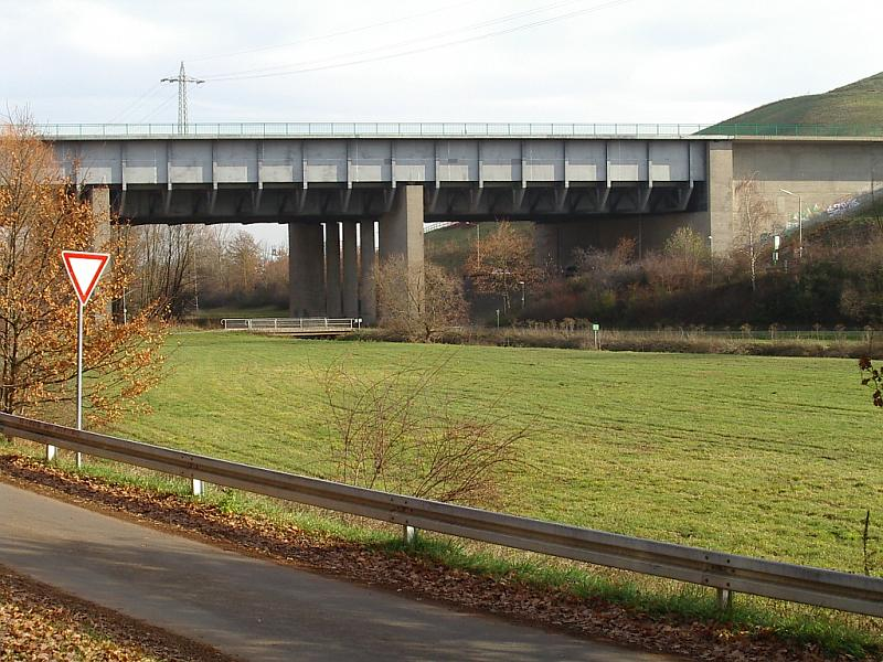 Beschreibung Main-Donau-Kanal, Brücke über das Zenntal bei Flexdorf/Atzenhof (Fürth (2003-11-23), v W Quelle Fotographie November 2003 Fotograph --Keichwa Copyright Status GNU Freie Dokumentationslizenz Im Vordergrund eine Leitplanke